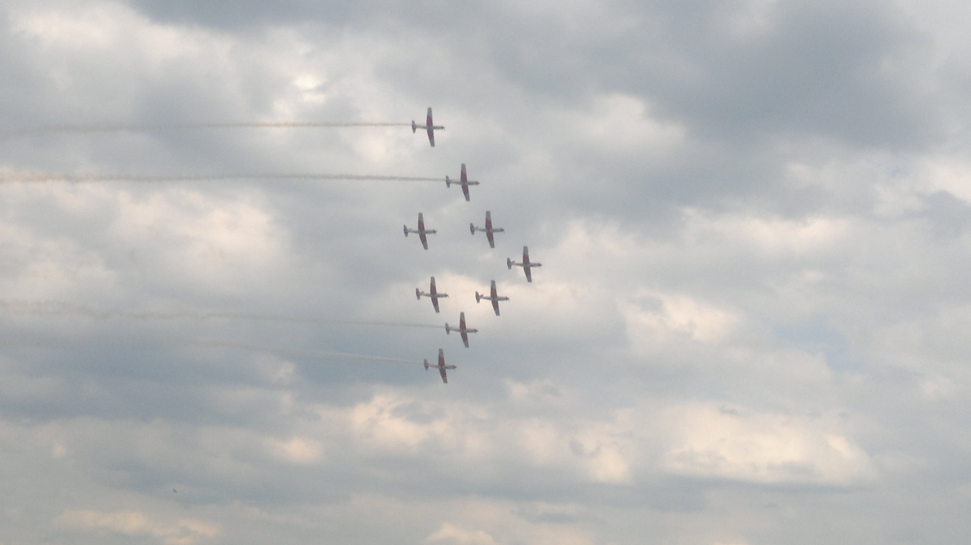 PC-7Team mit Rauch